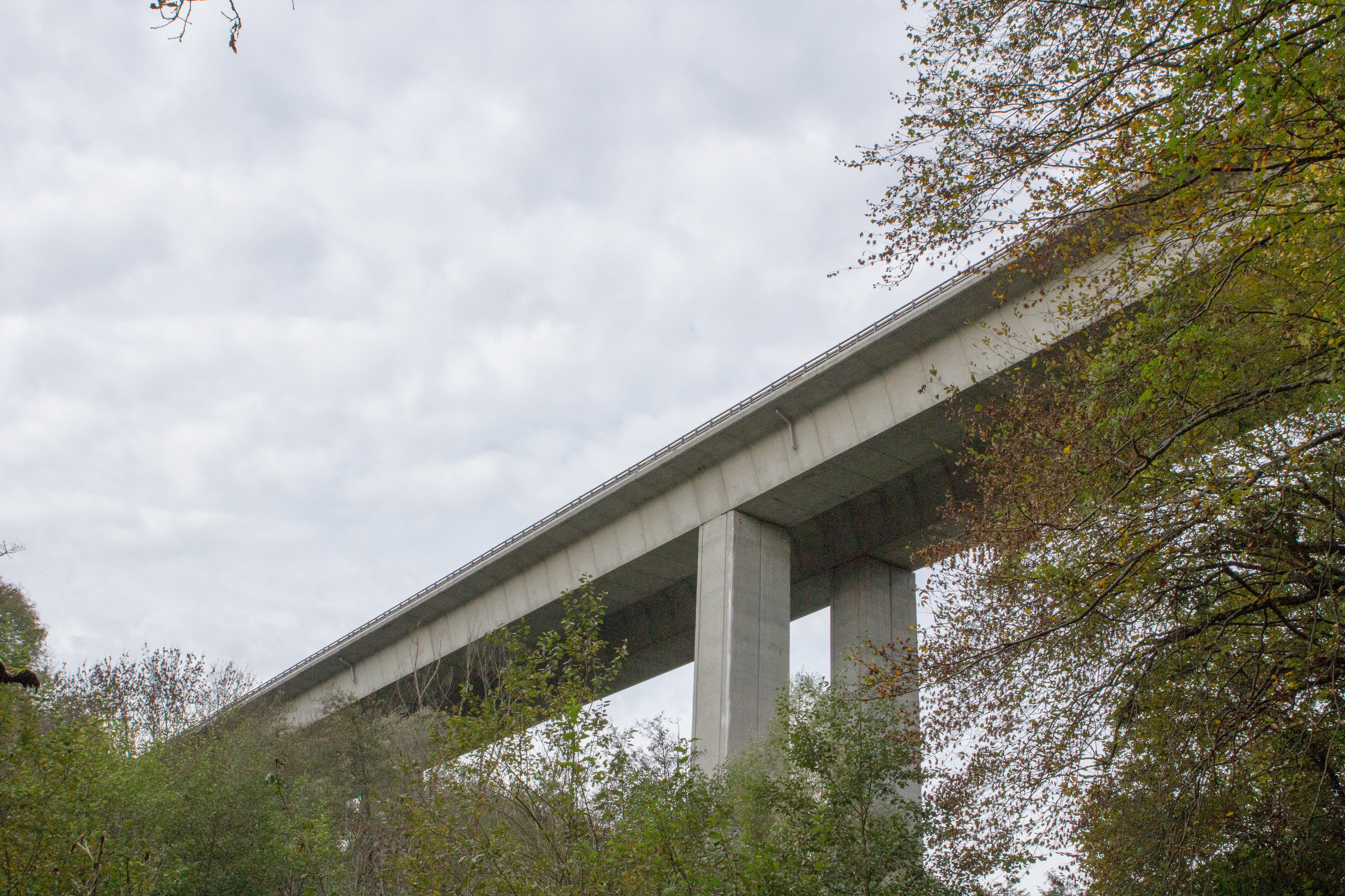 Viaduc de la Fure / Autoroure A48, Isére France